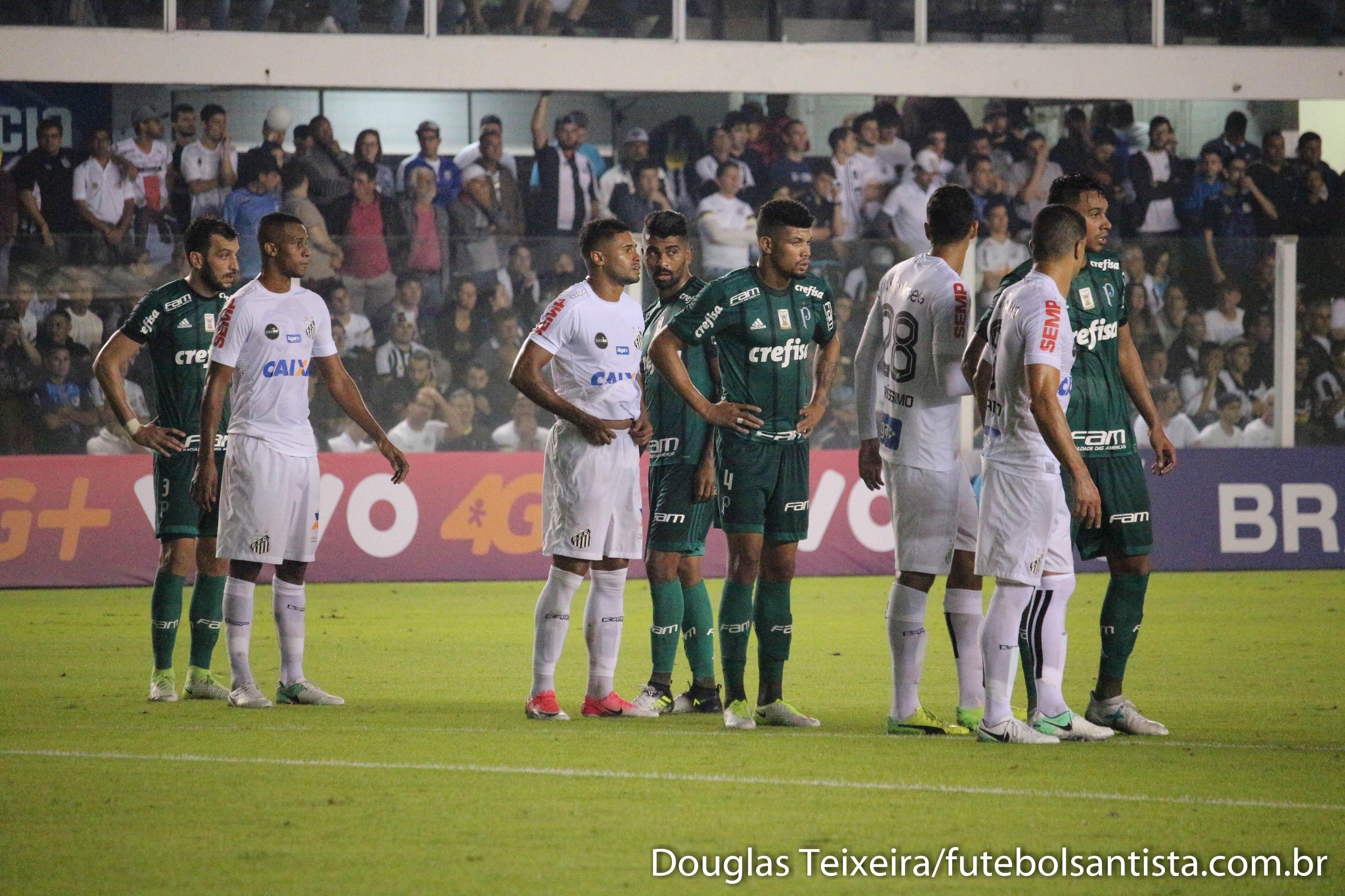 Foto: Douglas Teixeira/Futebol Santista